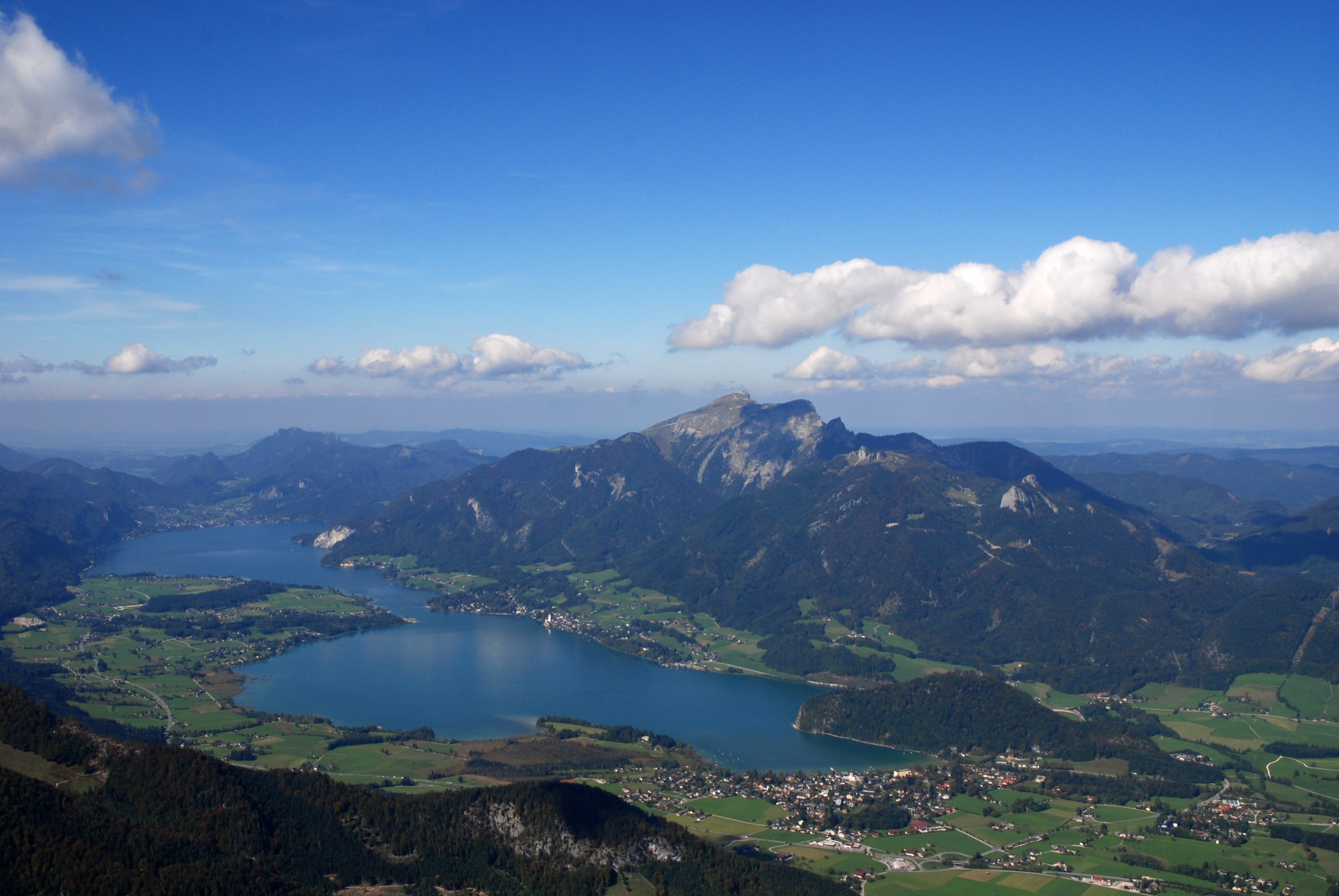 Wolfgangsee with Schafberg, Upper Austria, Austria